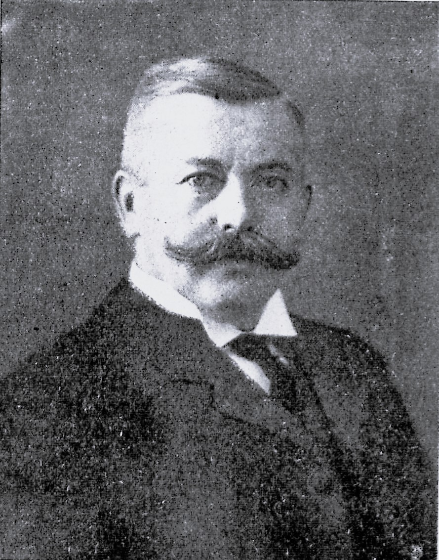 Senator Eduard Friedrich Ewers wurde am 18. März in den Ruhestand versetzt